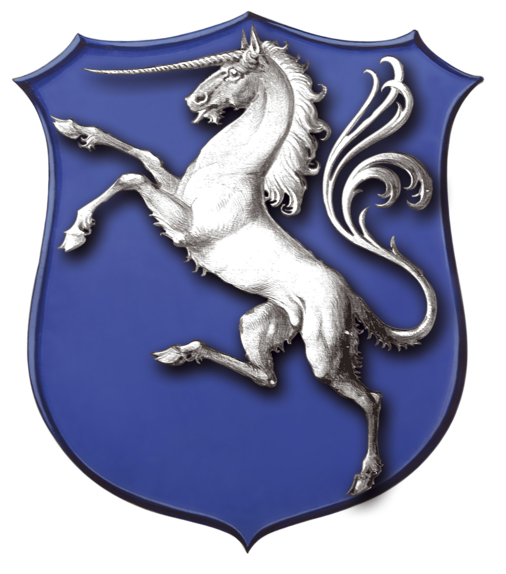 Oficiální erb Města Třešť.